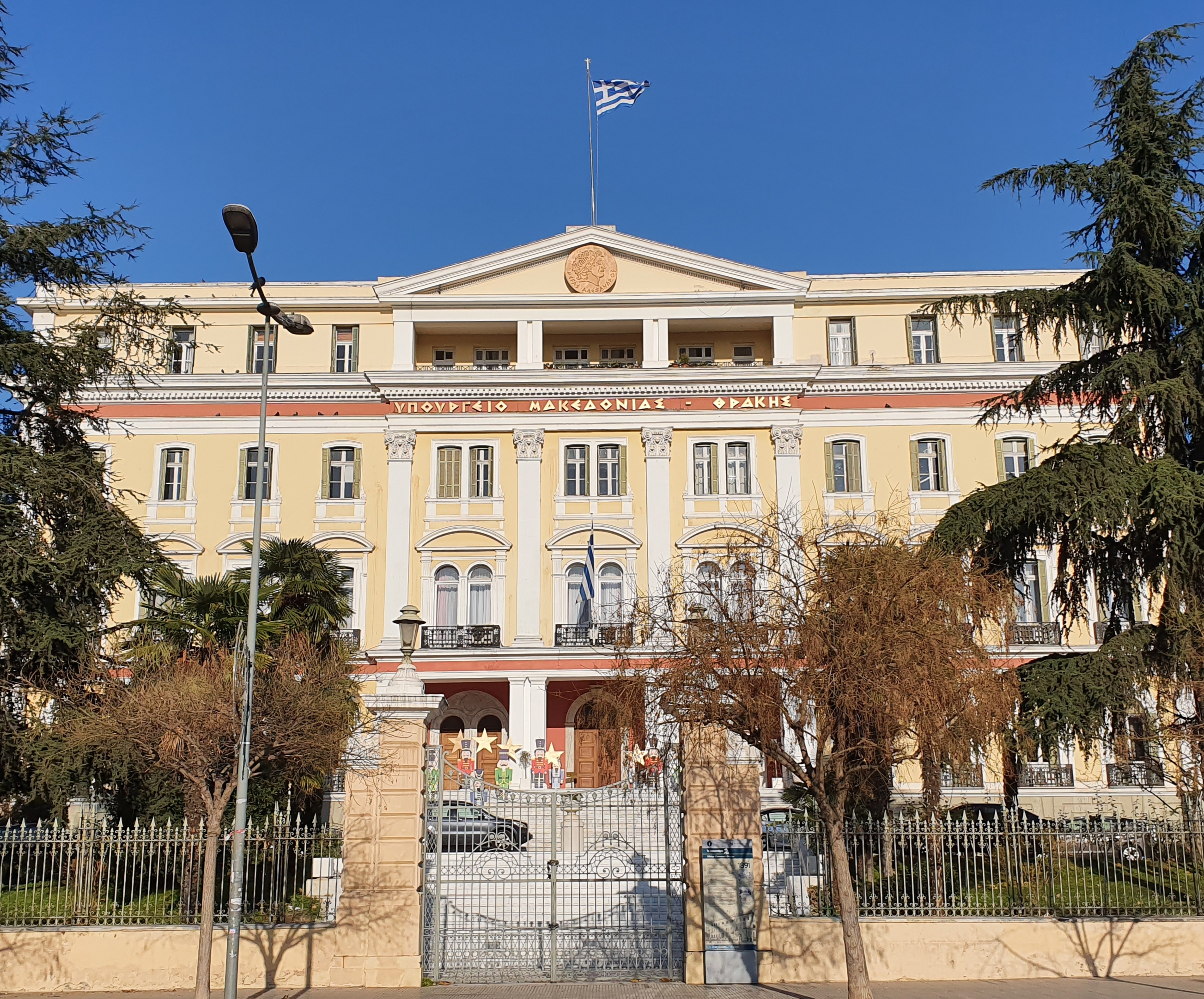 Υπουργείο Μακεδονίας - Θράκης